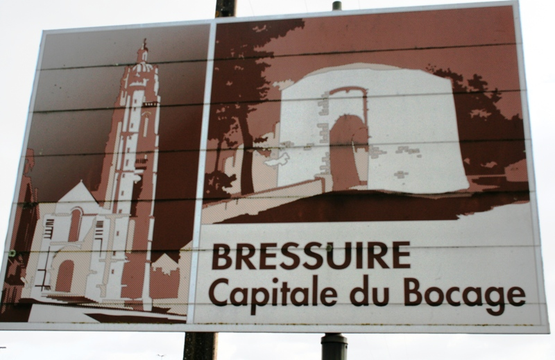 Français